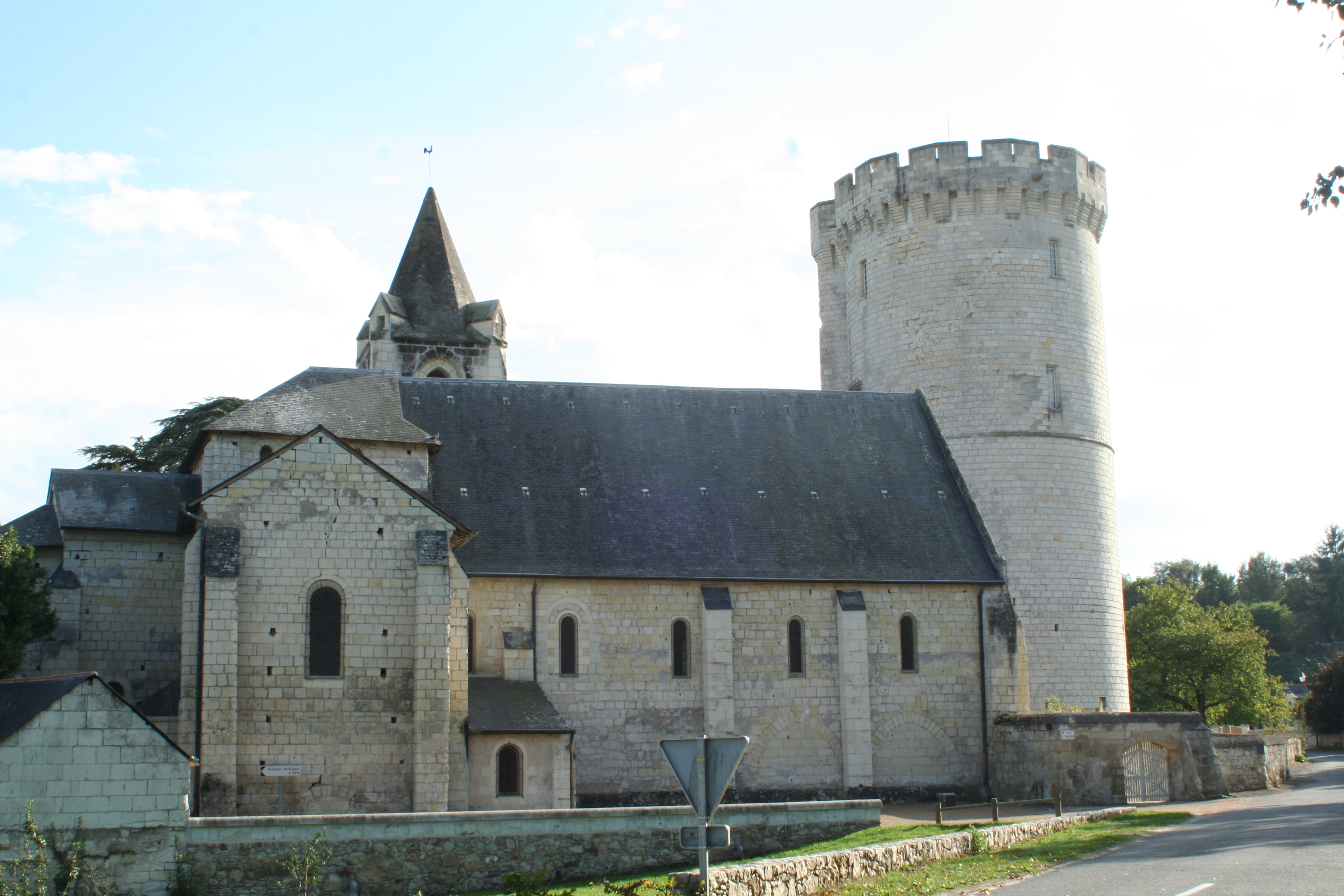 . Église Saint-Aubin de Trèves (commune de Chênehutte-Trèves-Cunault, Maine-et-Loire), vue du Nord.